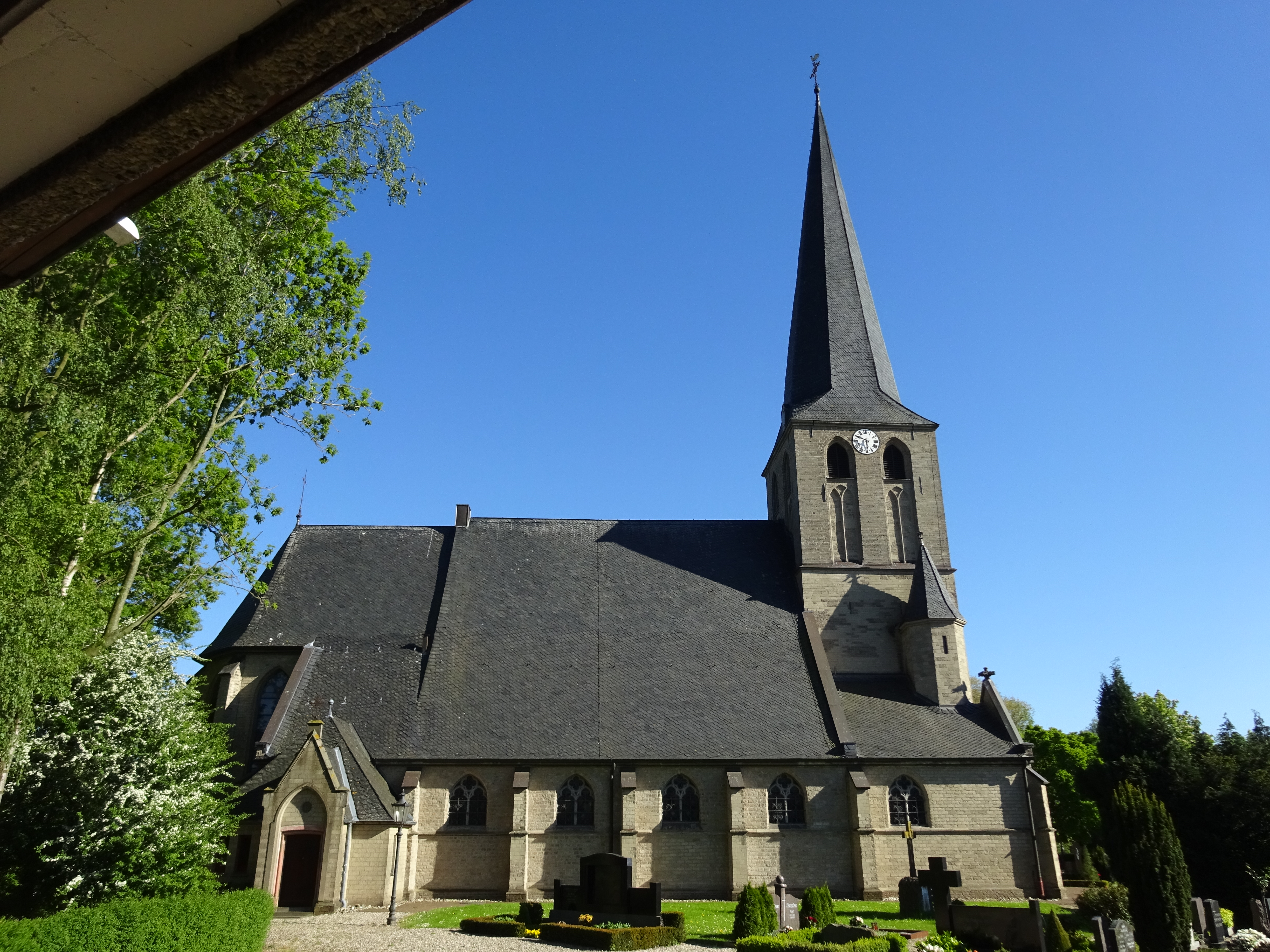 St. Regenfledis